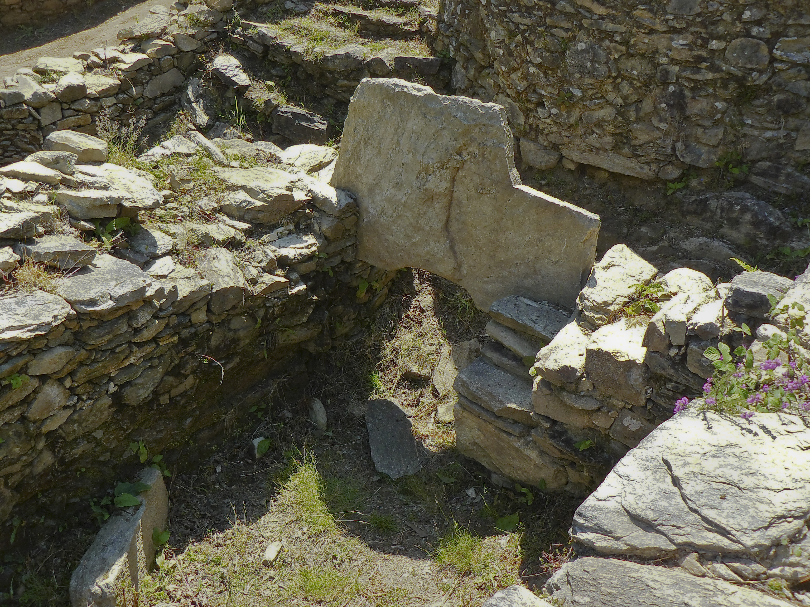 Pedra formosa sen decoración do monumento con forno descuberta nas recentes escavacións do castro Cabana de Bergantiños